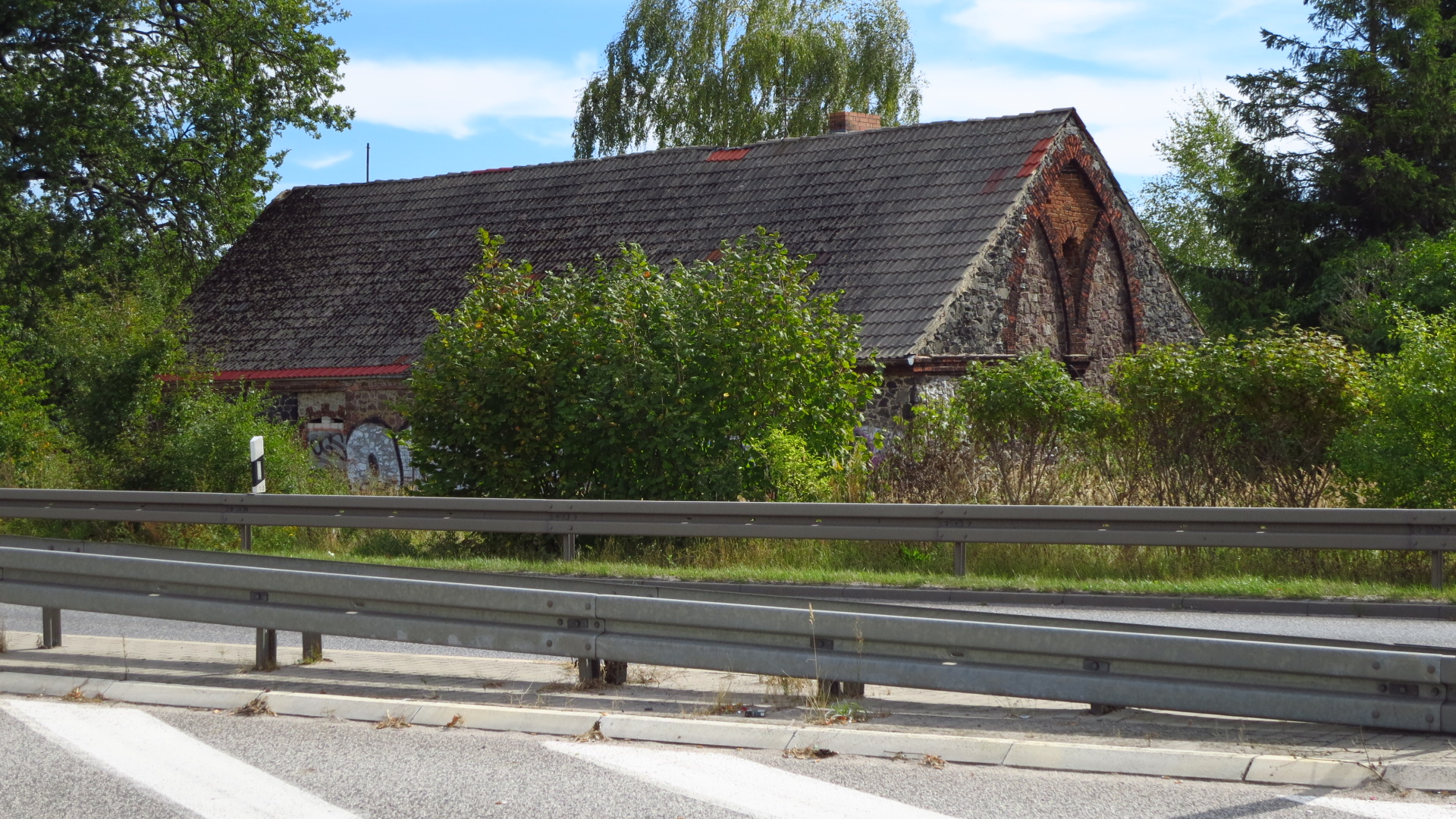 Chausseehaus, Nr. 5 in der Liste der Baudenkmale in Blumberg bei Ahrensfelde